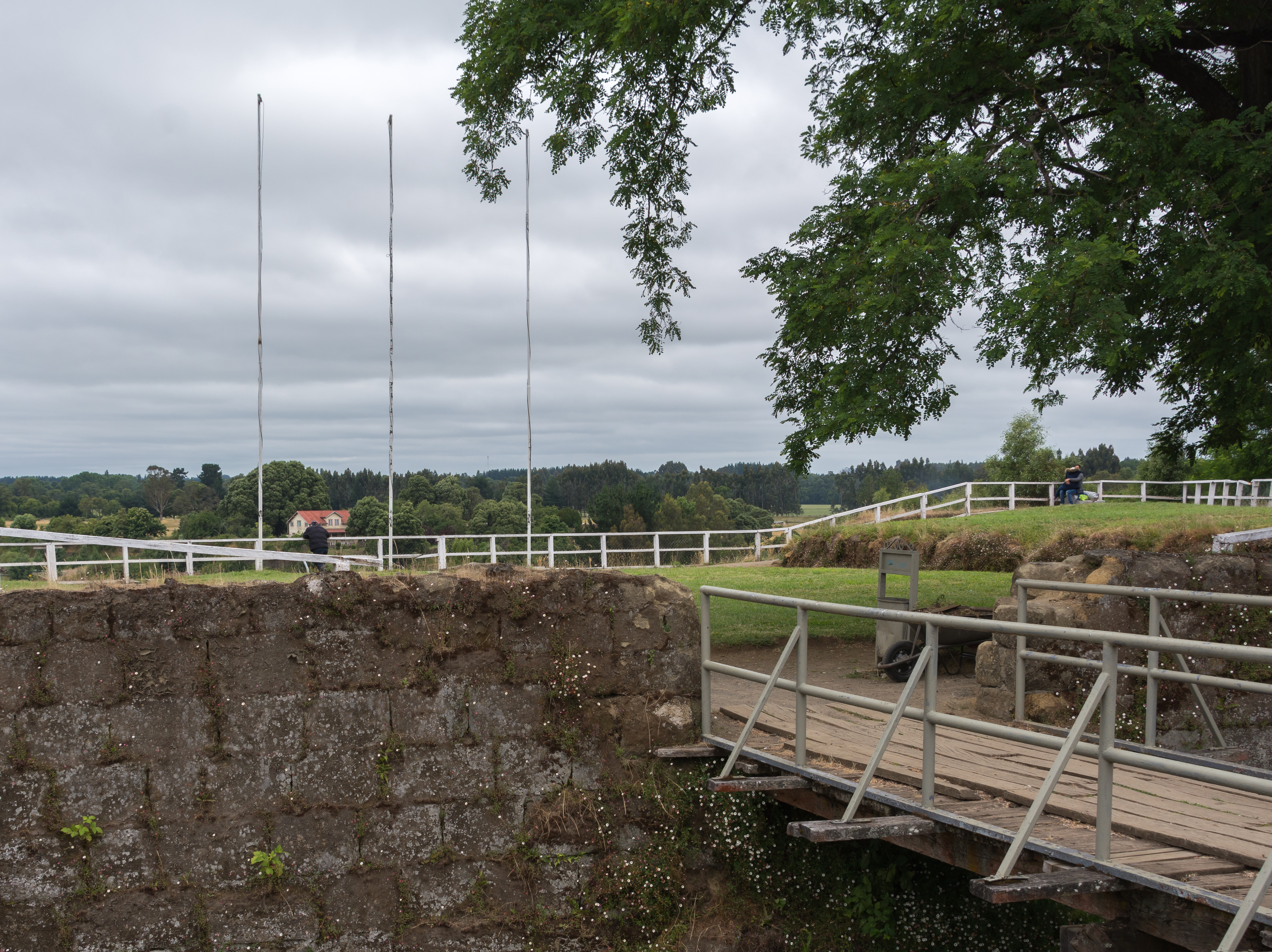 Fortín San José de Alcudia, Río Bueno, Región de Los Ríos, Chile.